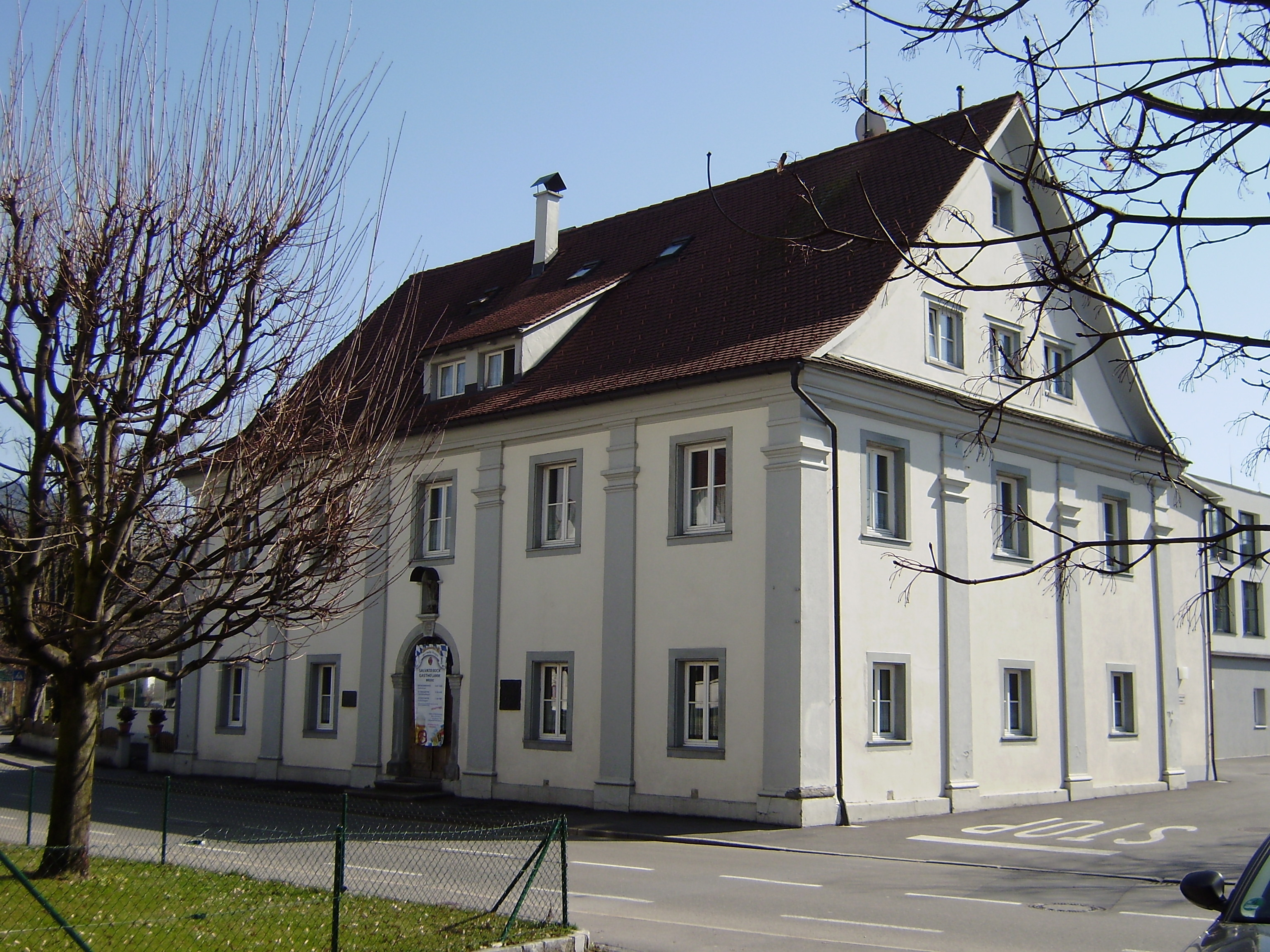 Amtshaus Kloster Mehrerau von NW, seit 1857 Gasthof Lamm, Bregenz (Vorarlberg)